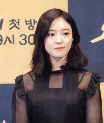 3일 오후 서울 논현동 임피리얼팰리스 호텔에서는 tvN 새 월화드라마 '왕이 된 남자'(극본 김선덕 신하은, 연출 김희원) 제작발표회가 열렸다.